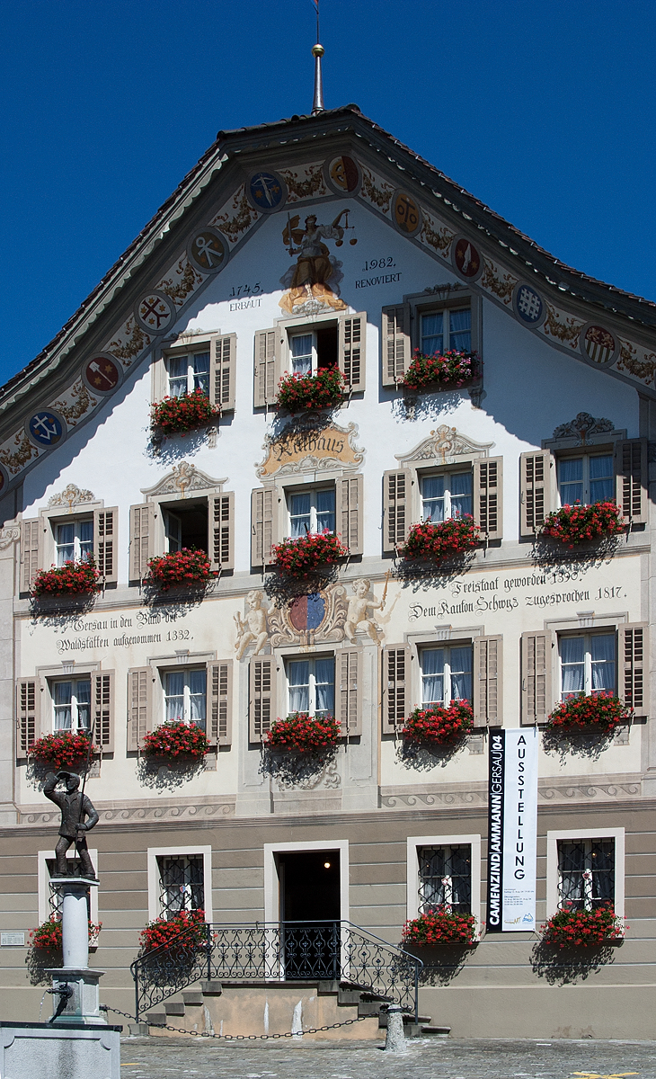 Altes Rathaus in Gersau (SZ)